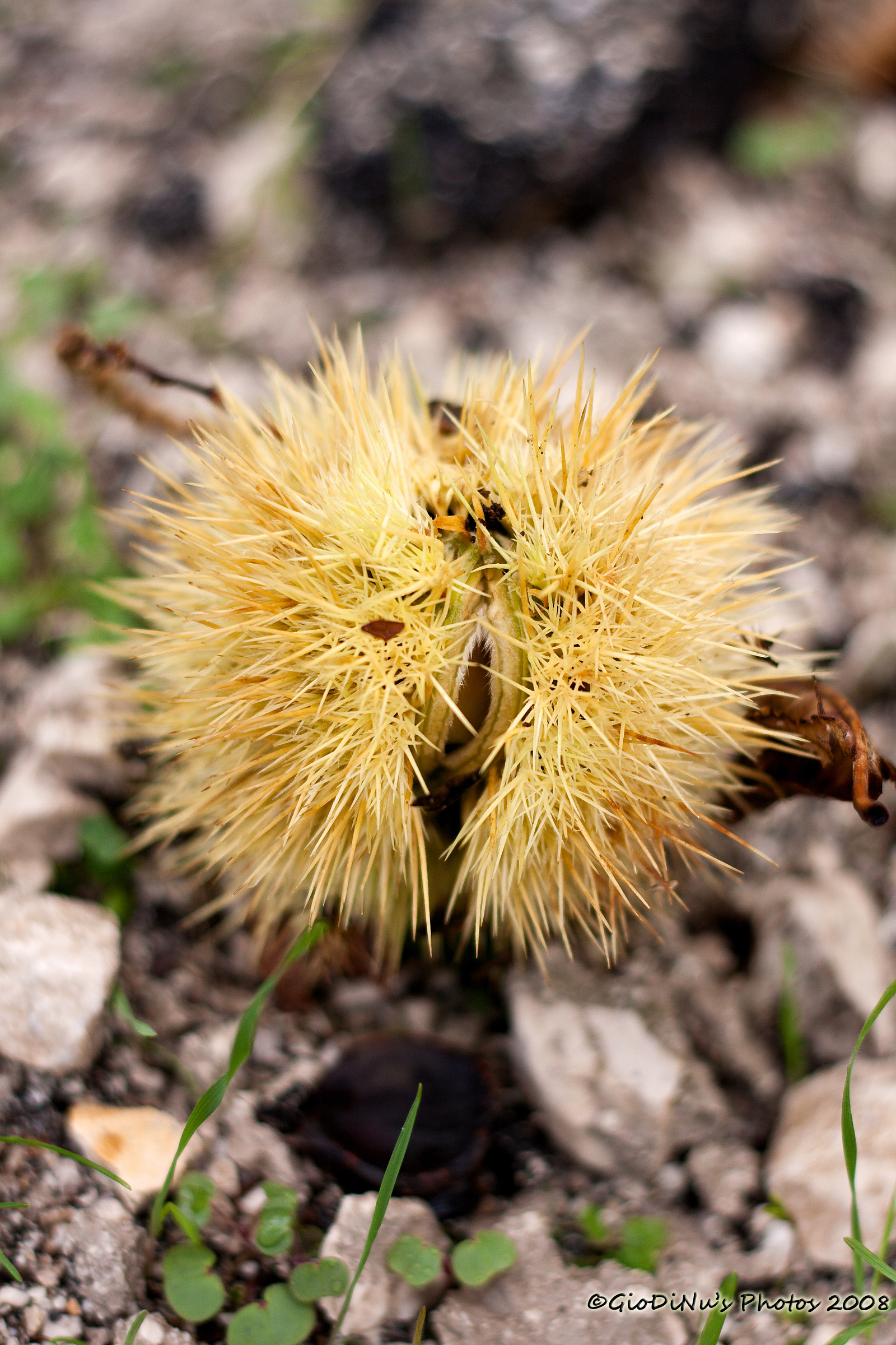 Riccio del castagna di Montella - Italia.